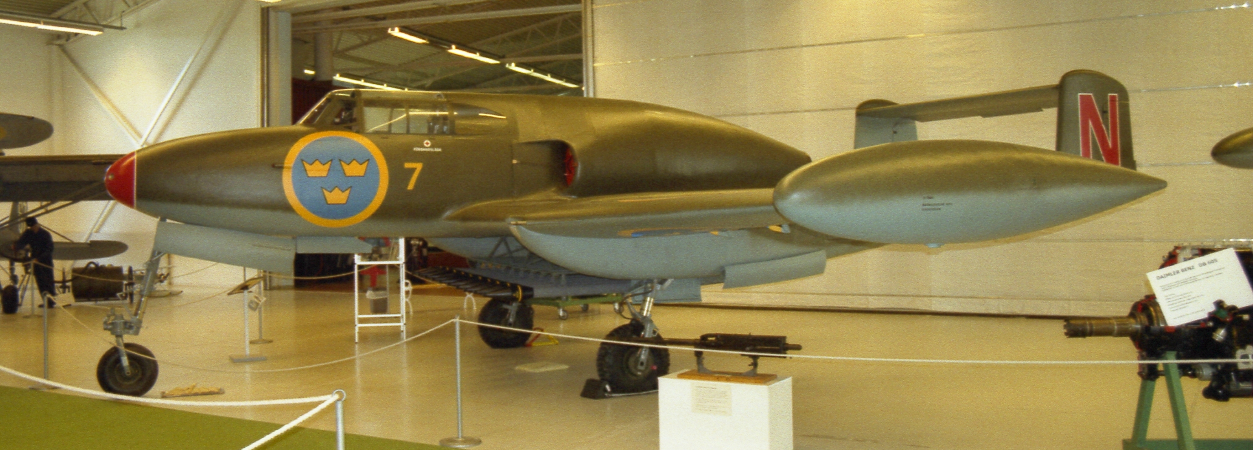 Jaktflygplan Saab J 21 R finns i Flygvapenmuseum Linköping 05.08.03